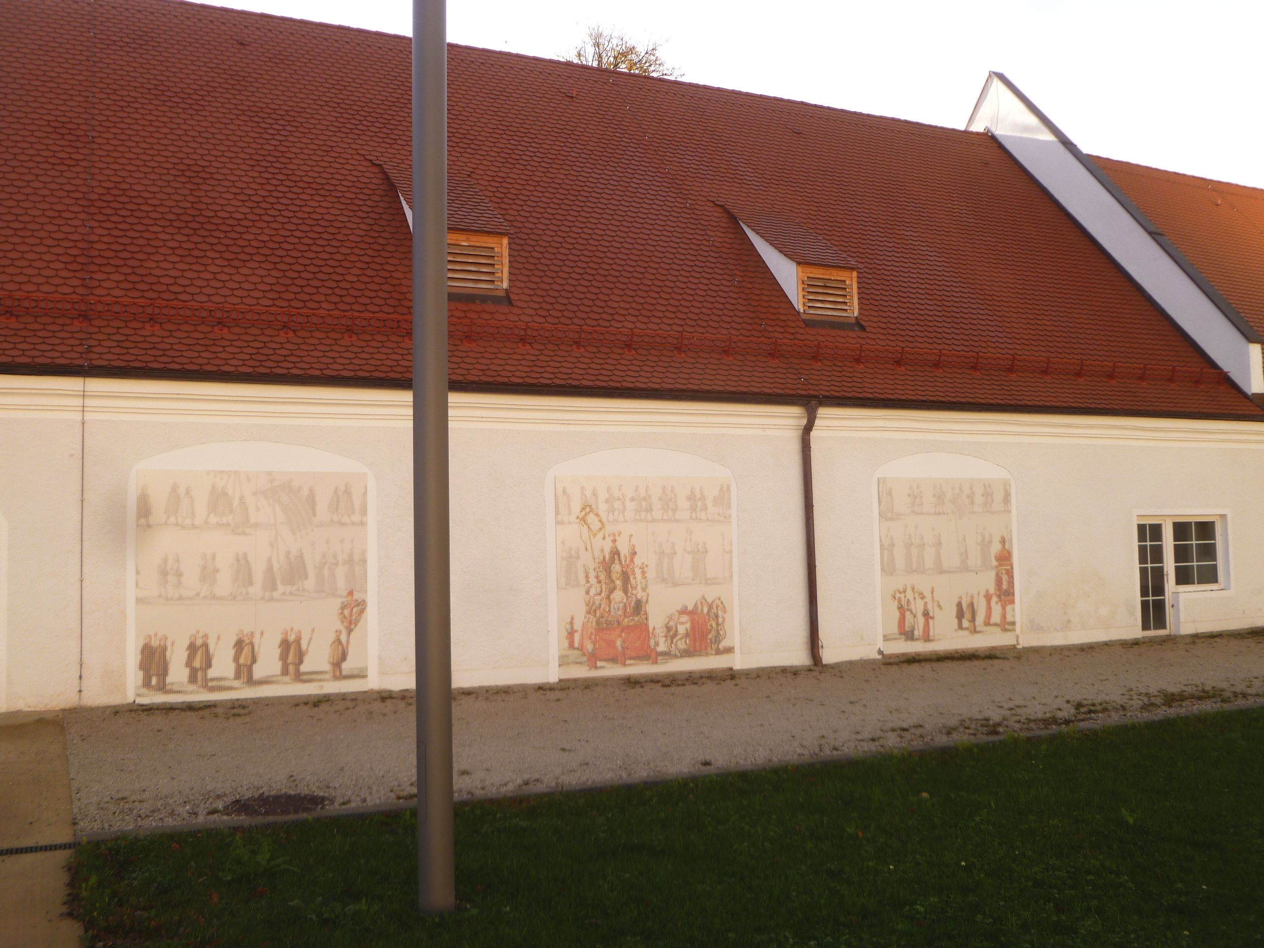 Gesamtanlage des ehem. Augustiner-Chorherrenklosters Ranshofen: Pfarrkirche (Stiftskirche), "Schlössl" (Klostertrakte), Meierhof, Friedhof mit Karner, Einfriedungsmauern mit Portalanlagen, Gartenbaudenkmale im ehem. Konventgarten; Reste von Vorgängerbauten